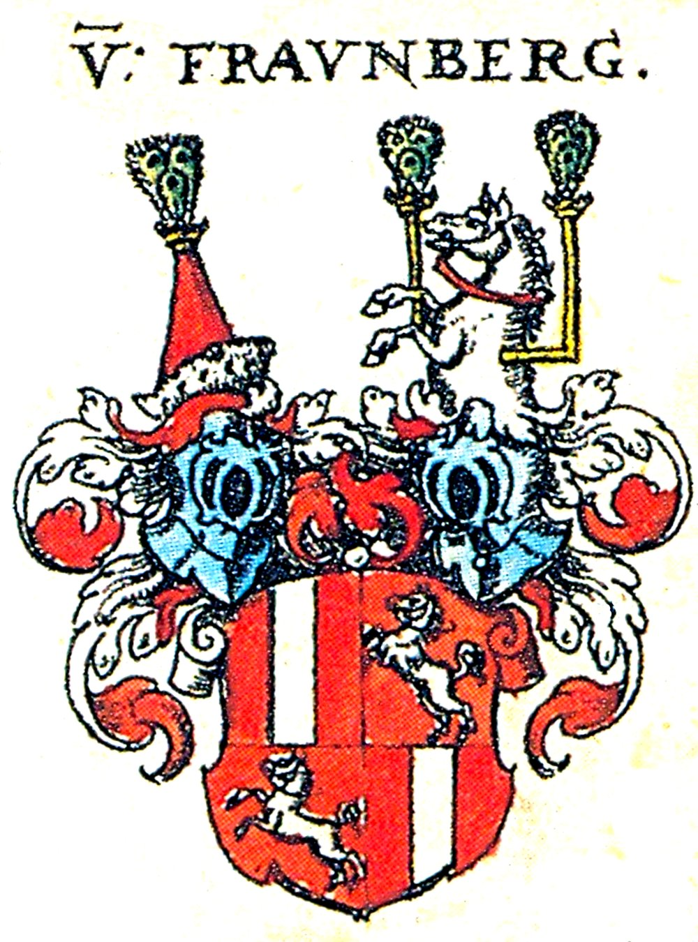 Wappen der Bayerischen Adelsfamilie Fraunberg